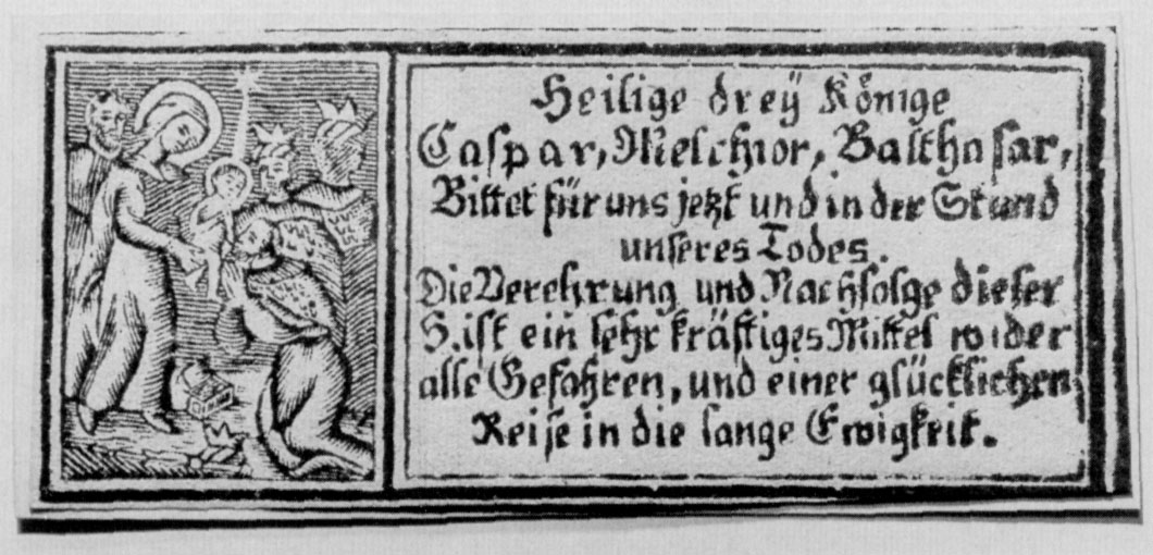 Ein Dreikönigszettel